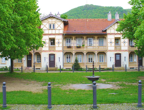 Historische Arbeiterssiedlung in Kuchen/Fils